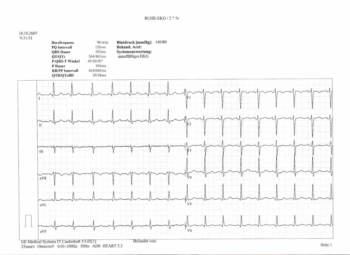 A normal 12 channel ECG.